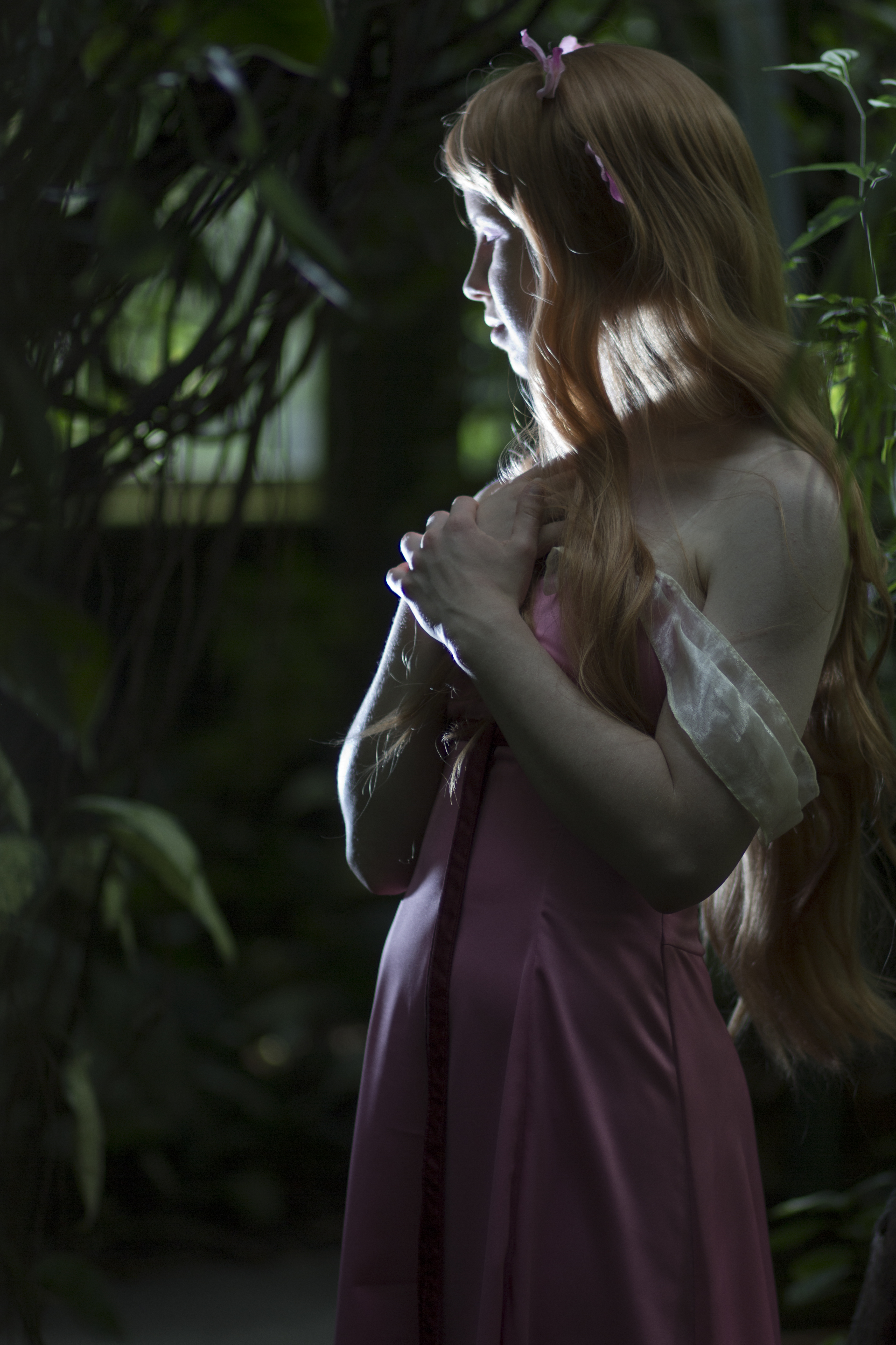 Giselle